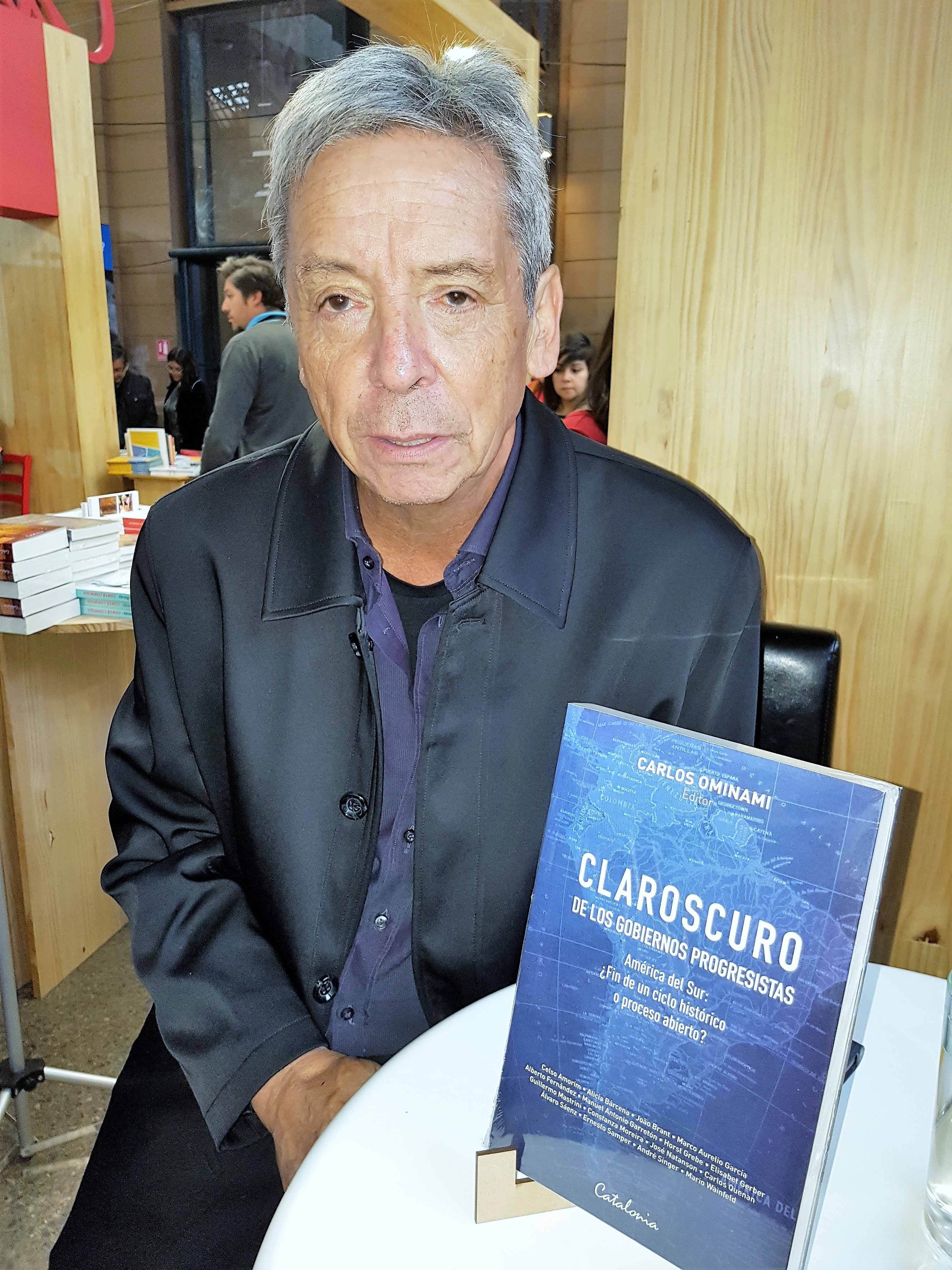 El político chileno Carlos Ominami en la Feria Internacional del Libro de Santiago 2017.